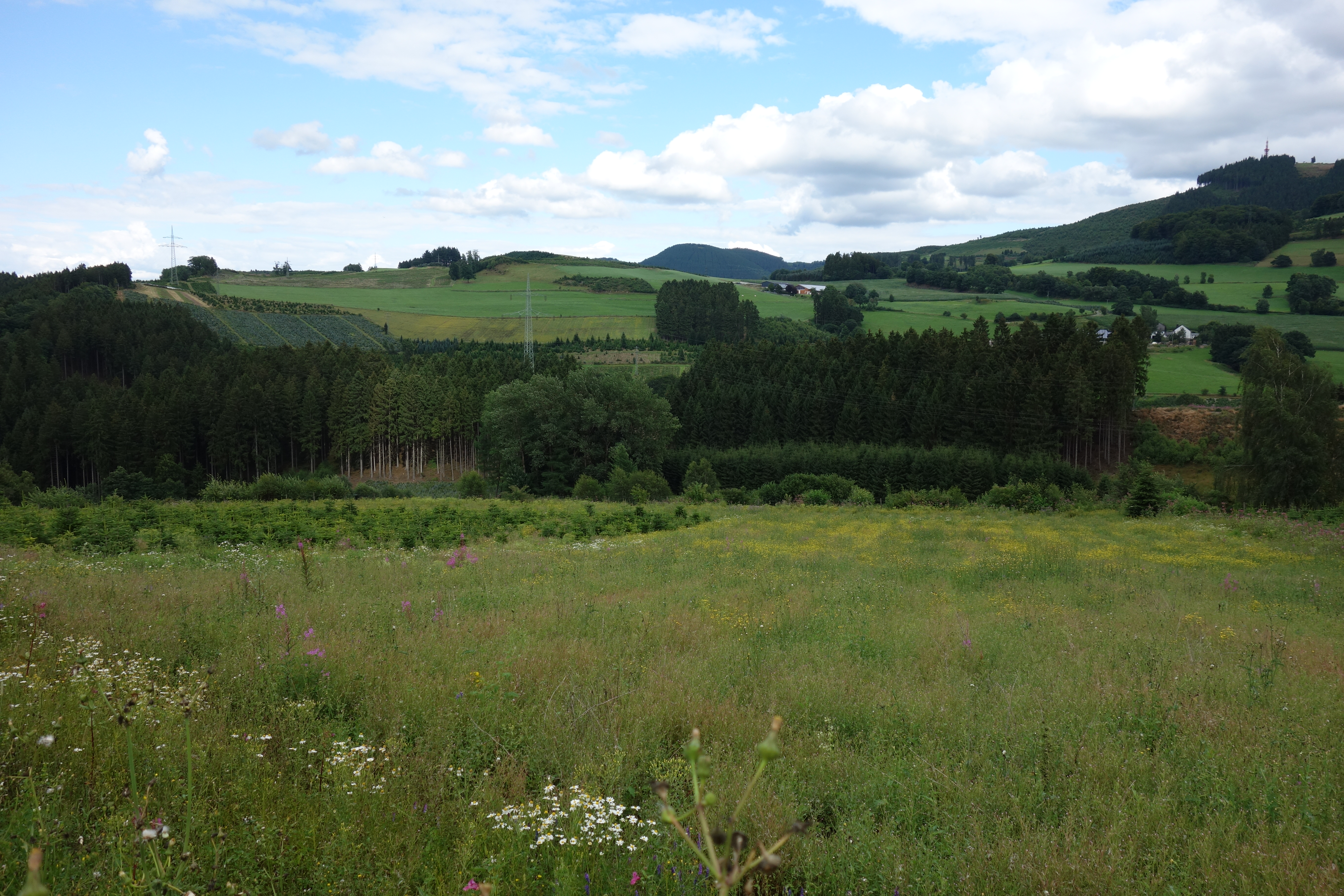 Offenland gehört zum Landschaftsschutzgebiet Offenland um Ramsbeck und Andreasberg und Wald zum Landschaftsschutzgebiet Bestwig. Von Straße nach Berlar aufgenommen.